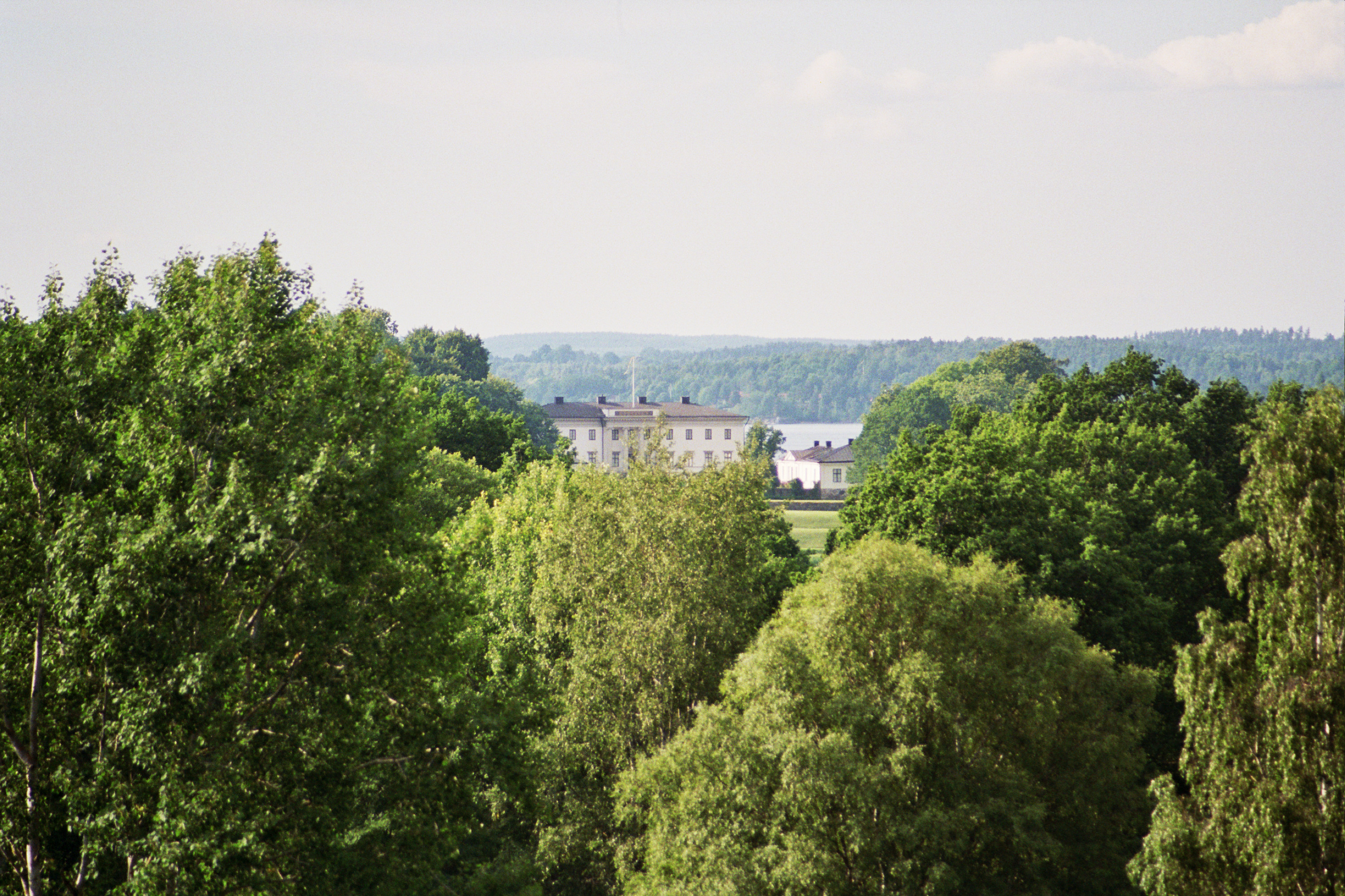 Prinskullen är en utsiktsplats nära Stjärnsunds slott.